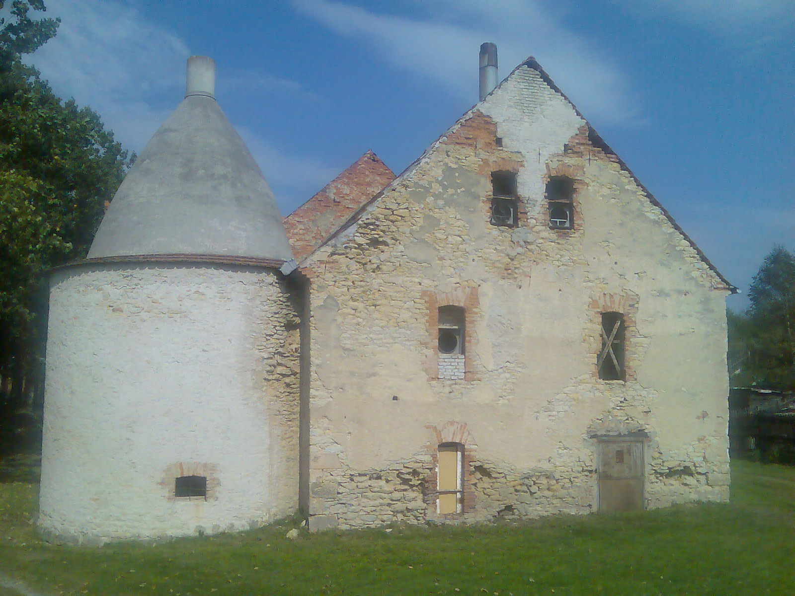 Sušárna chmele v Dubé, Jana Roháče 195.